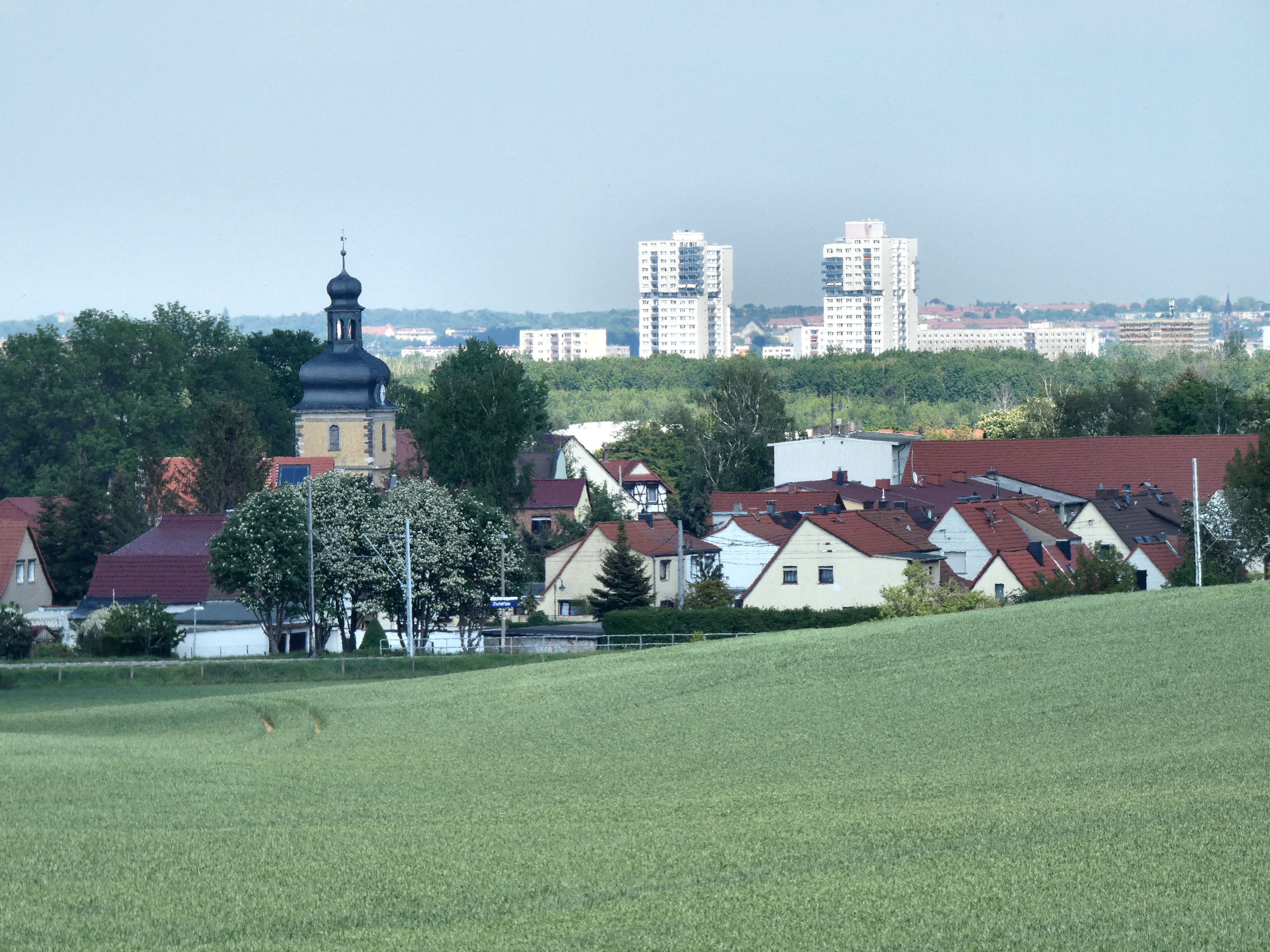 Zscherben (Gemeinde Teutschenthal) mit Halle-Neustadt im Hintergrund